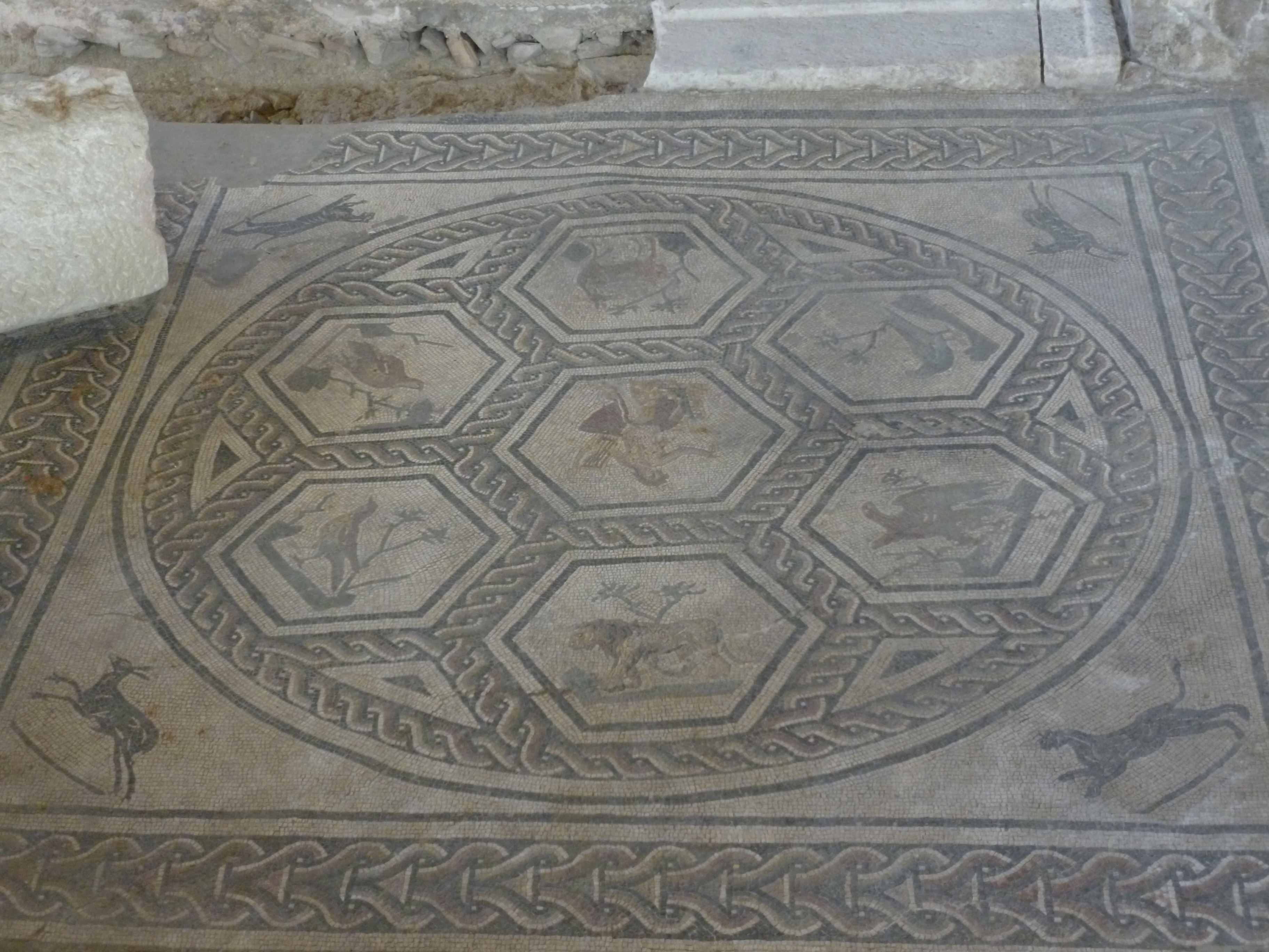 Domus del Chirurgo (sito archeologico) This is a photo of a monument which is part of cultural heritage of Italy.